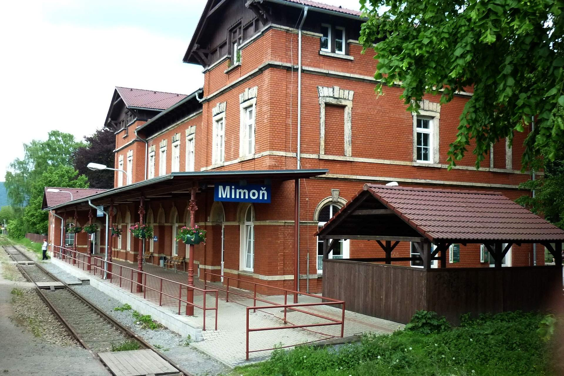 Mimoň - vlakové nádraží